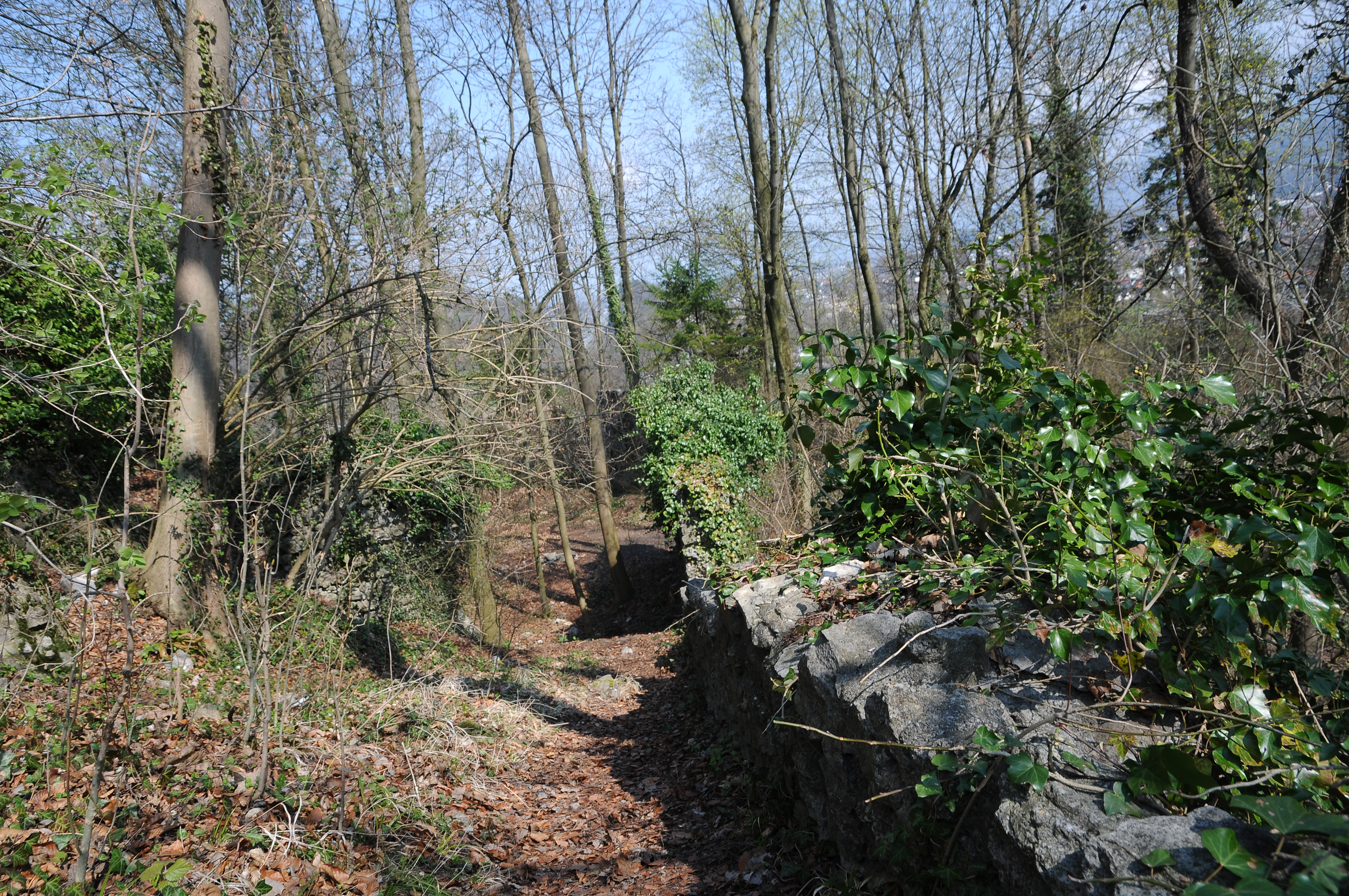 Die Burgruine Neuburg (Koblach) in der Gemeinde Koblach in Vorarlberg steht auf dem gleichnamigen Inselberg in der Rheintalebene. Die Anlage steht unter Denkmalschutz.